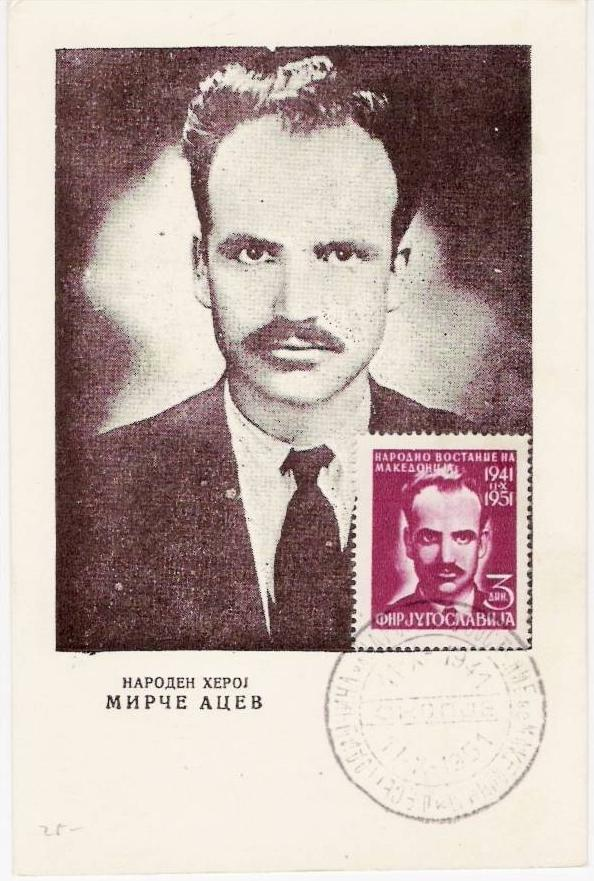 Мирче Ацев на югославска пощенска картичка